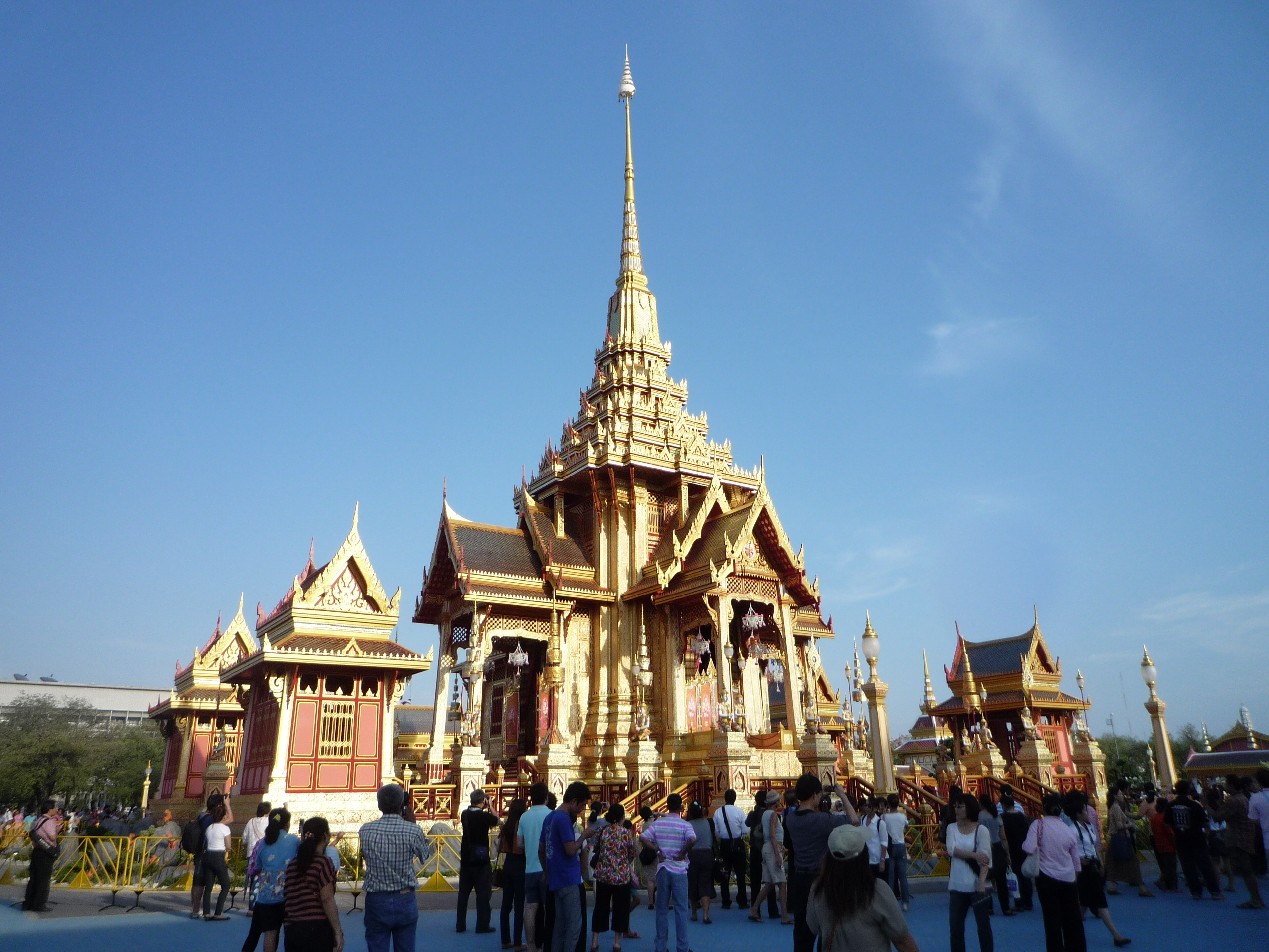 พระเมรุ สมเด็จพระเจ้าภคินีเธอ เจ้าฟ้าเพชรรัตนราชสุดา สิริโสภาพัณณวดี ถ่ายเมื่อ 12 เมษายน 2555